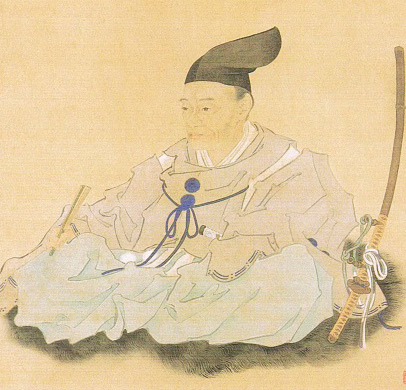 水野忠啓像 墨田区（楢崎コレクション） 墨田区指定有形文化財